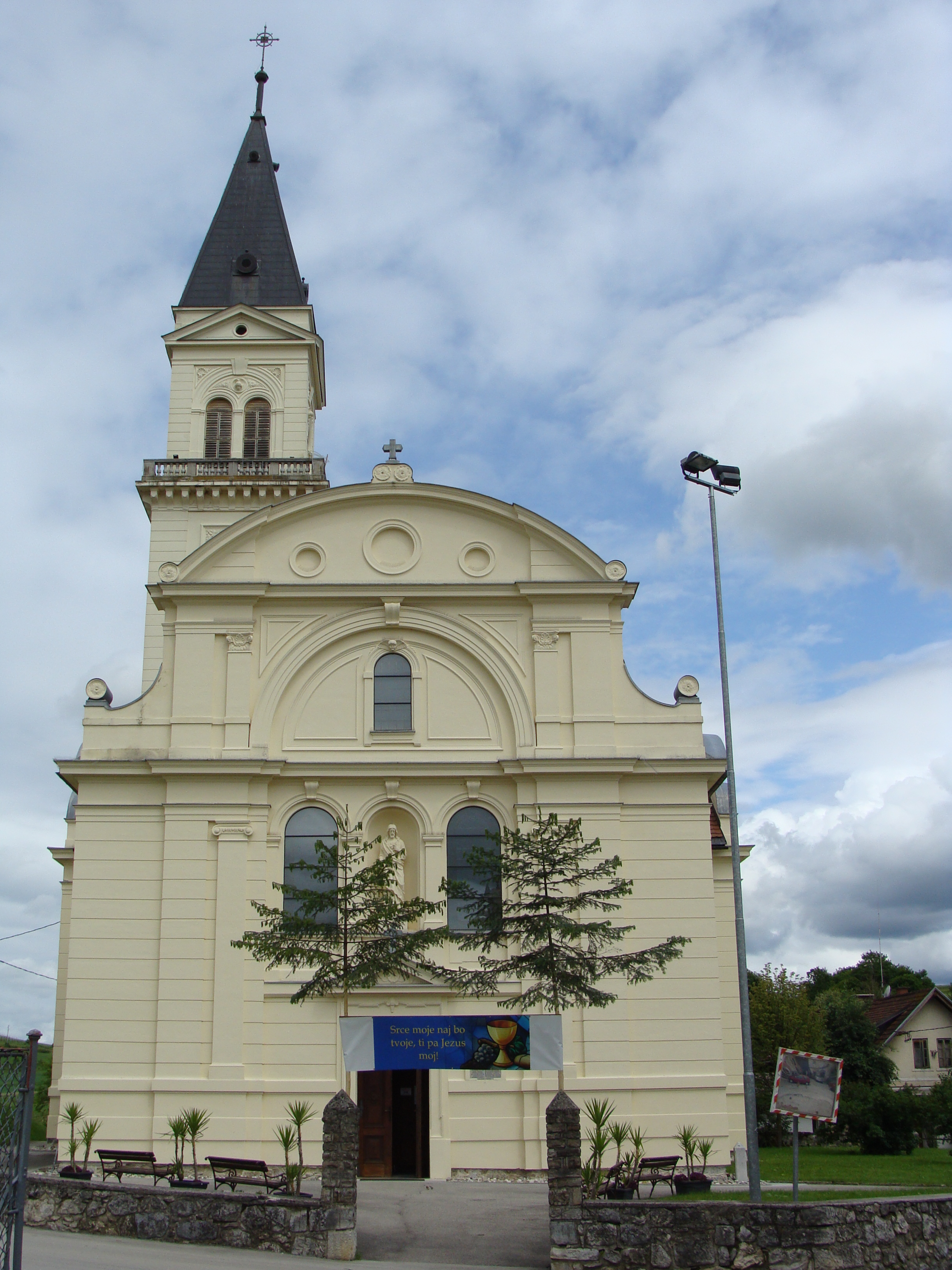 Cerkev sv. Marjete, Šmarjeta